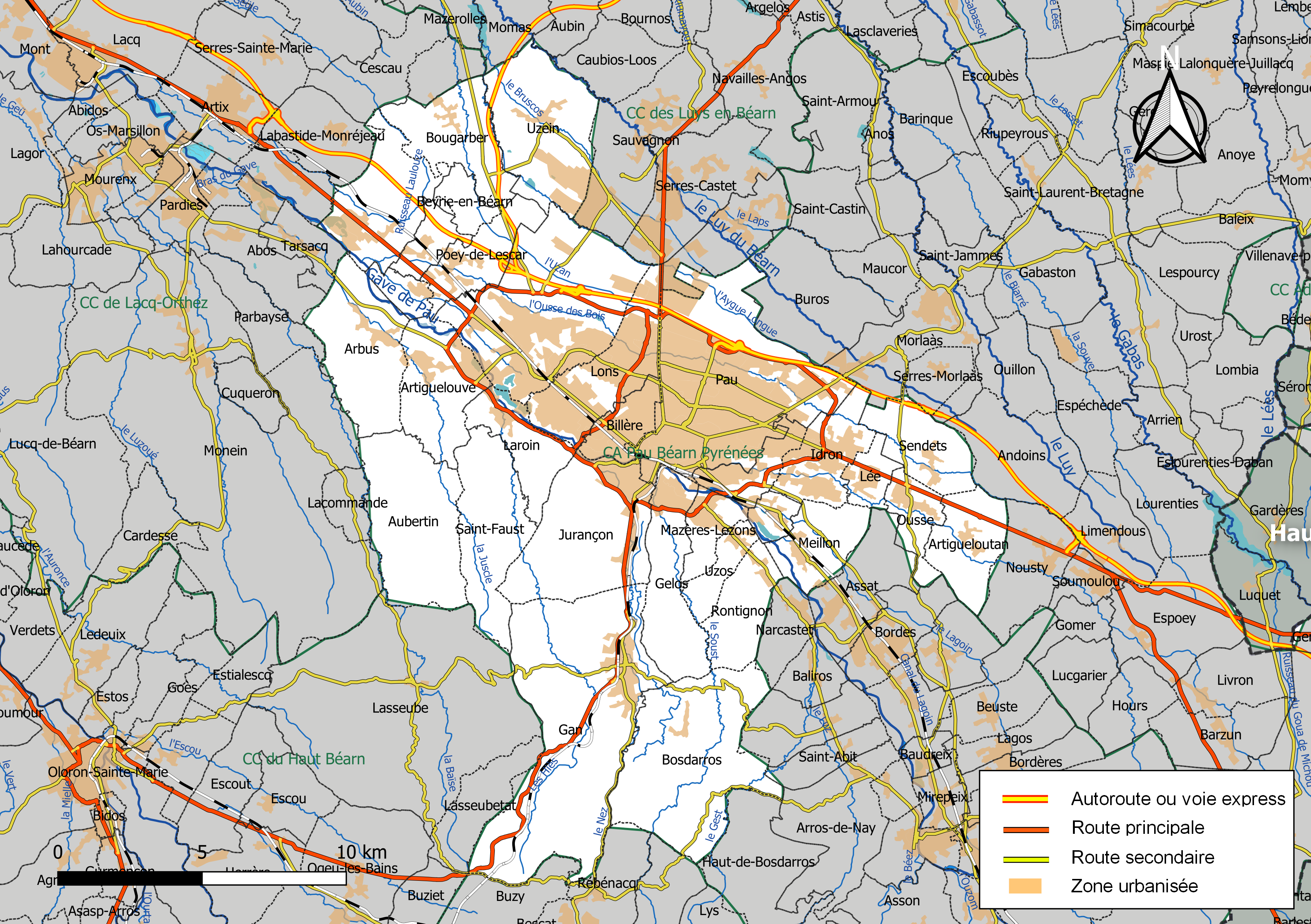 Carte géographique de la Communauté d'agglomération Pau Béarn Pyrénées, département des Pyrénées-Atlantiques, France. Composition au 1er janvier 2019.